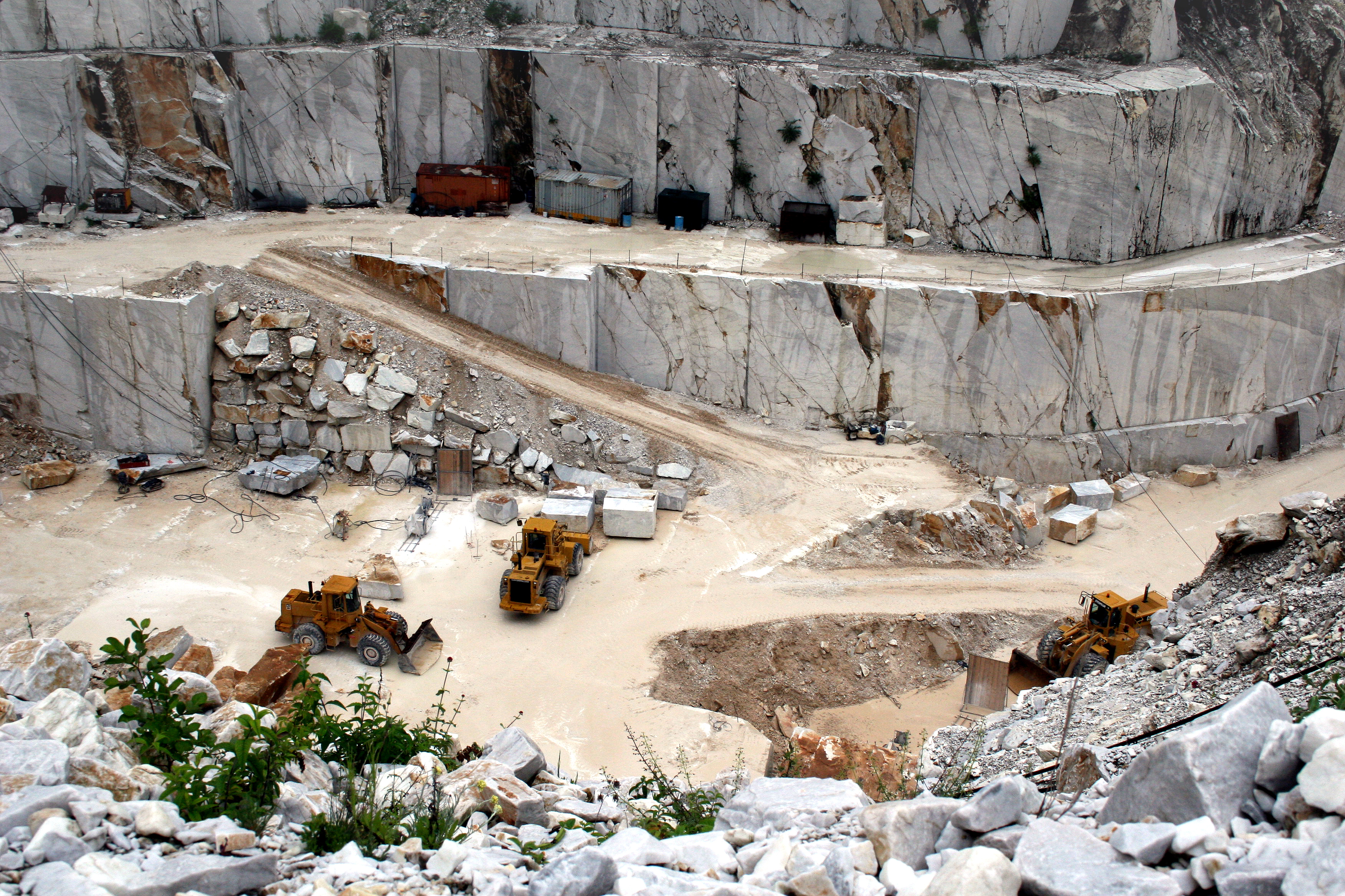 Marmorsteinbruch bei Carrara mit Radladern.